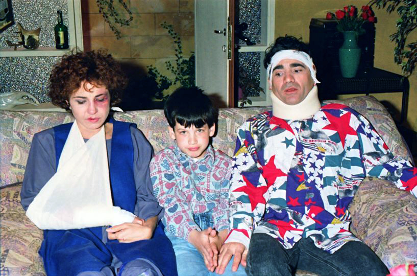 ענת וקסמן ומשה איבגי בהצגה: "ריבים ואוהבים" המוצגת גם בשם: "רוני רוני ורוני" שכתב יהונתן גפן